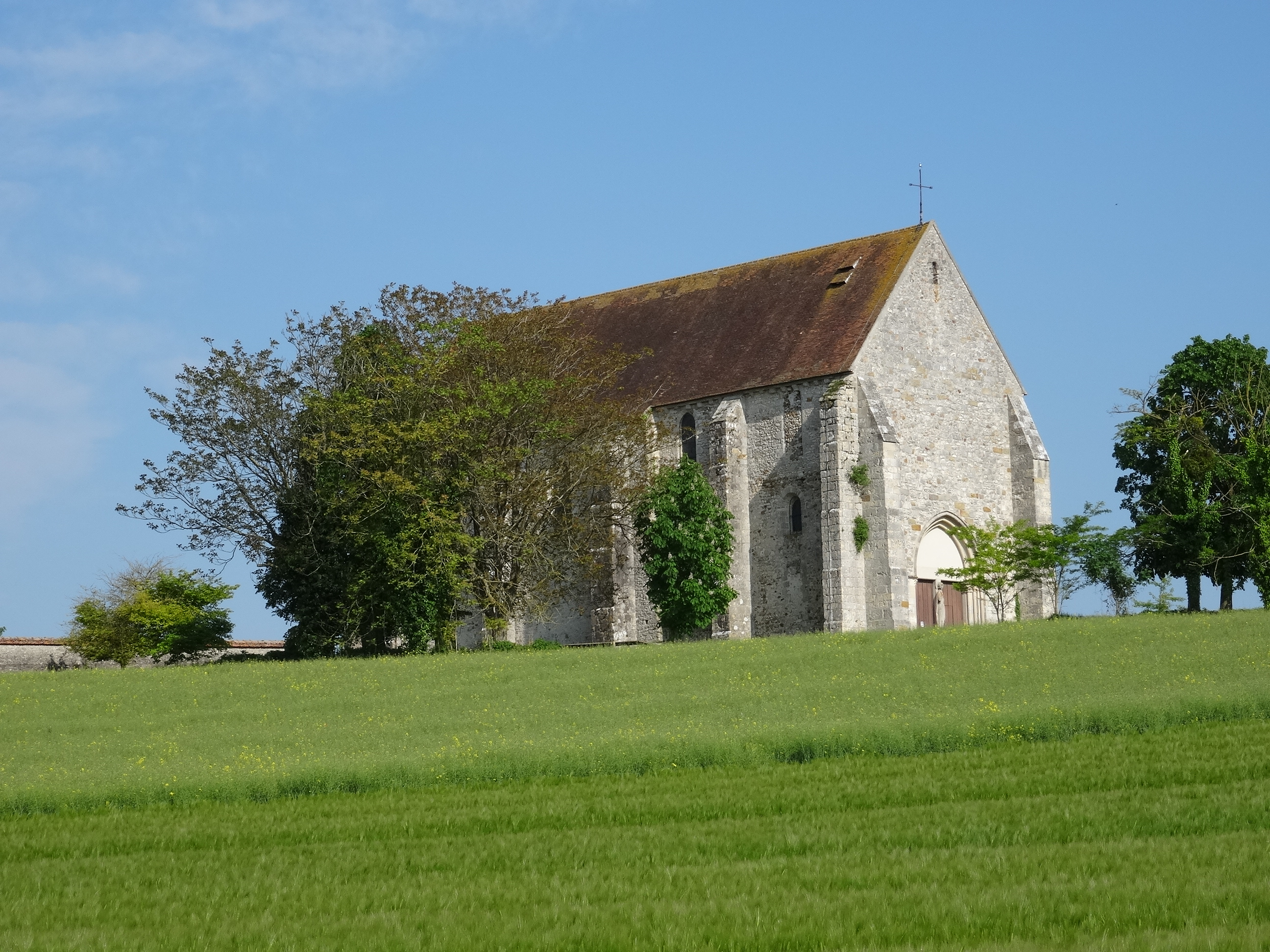 Église Saint-Ferréol-et-Saint-Maclou de Paroy. (Seine-et-Marne, région Île-de-France).